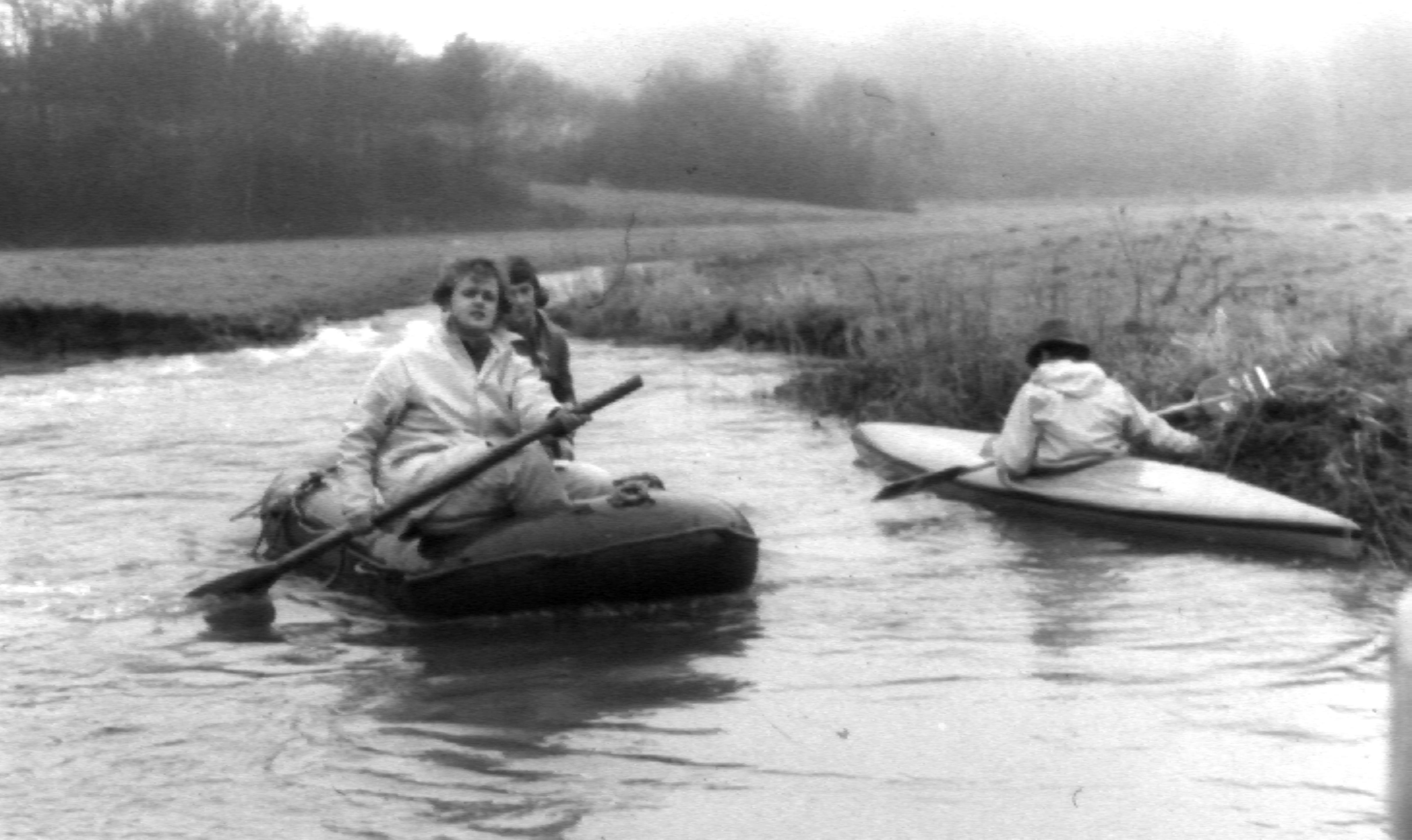 Winterbefahrung des Hahnenbachs bei Hausen Anfang der 70er Jahre durch den Hunsrücker Kanusportverein.